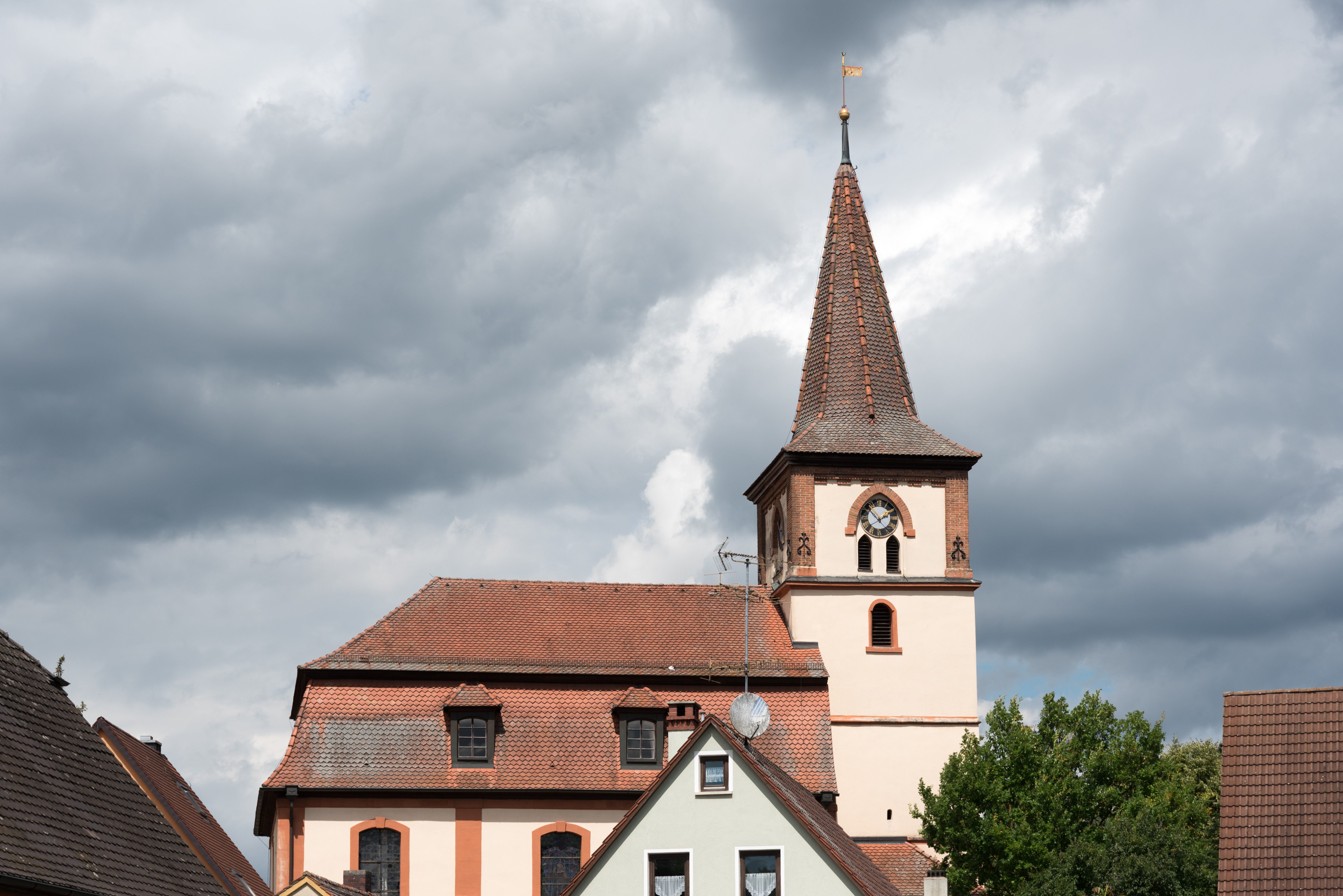 Uehlfeld, Schornweisach, Evang.-Luth. Pfarrkirche St. Roswinda